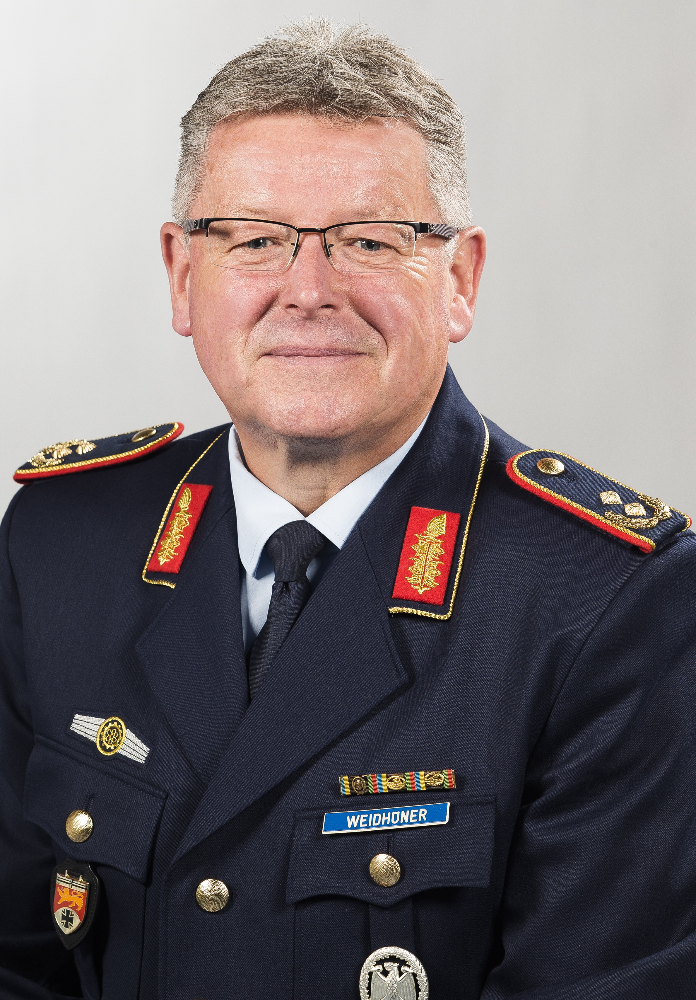 Franz Weidhüner, Amtschef Streitkräfteamt